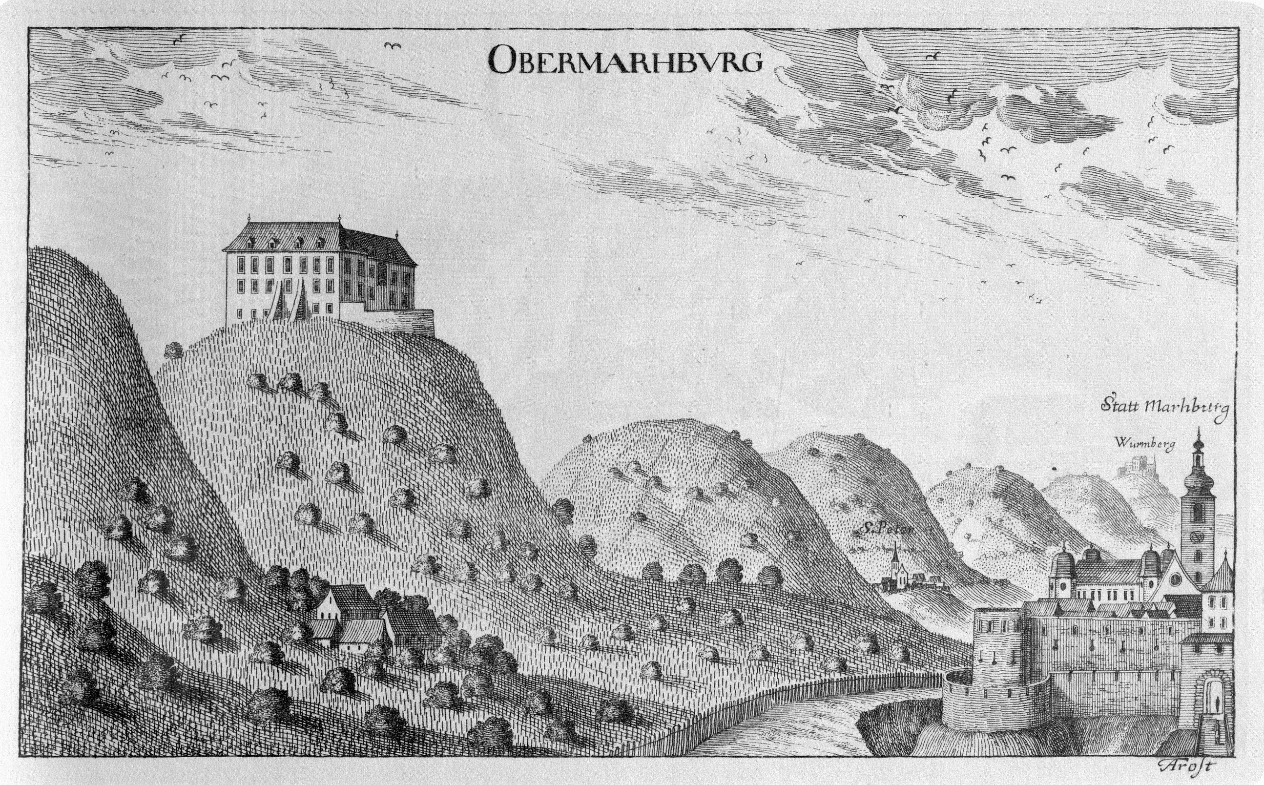 G. M. Vischers Käyserlichen Geographi, Topographia Ducatus Stiriae, Das ist: Eigentliche Delineation / und Abbildung aller Städte / Schlösser / Marcktfleck / Lustgärten / Probsteyen / Stiffter / Clöster und Kirchen / so es sich im Herzogthumb Steyrmarck befinden; Und anjetzo Umb einen billichen Preyß zu finden seynd Bey Johann Bitsch Universitäts Buchhandlern / Auff dem Juden=Platz bey der guldenen Saulen. Graz 1681 Die Nummerierung der Dateien folgt der alphabetischen Reihung der Ortsnamen